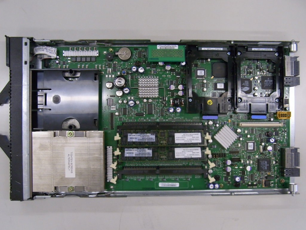 IBM BladeCenter HS20 8678